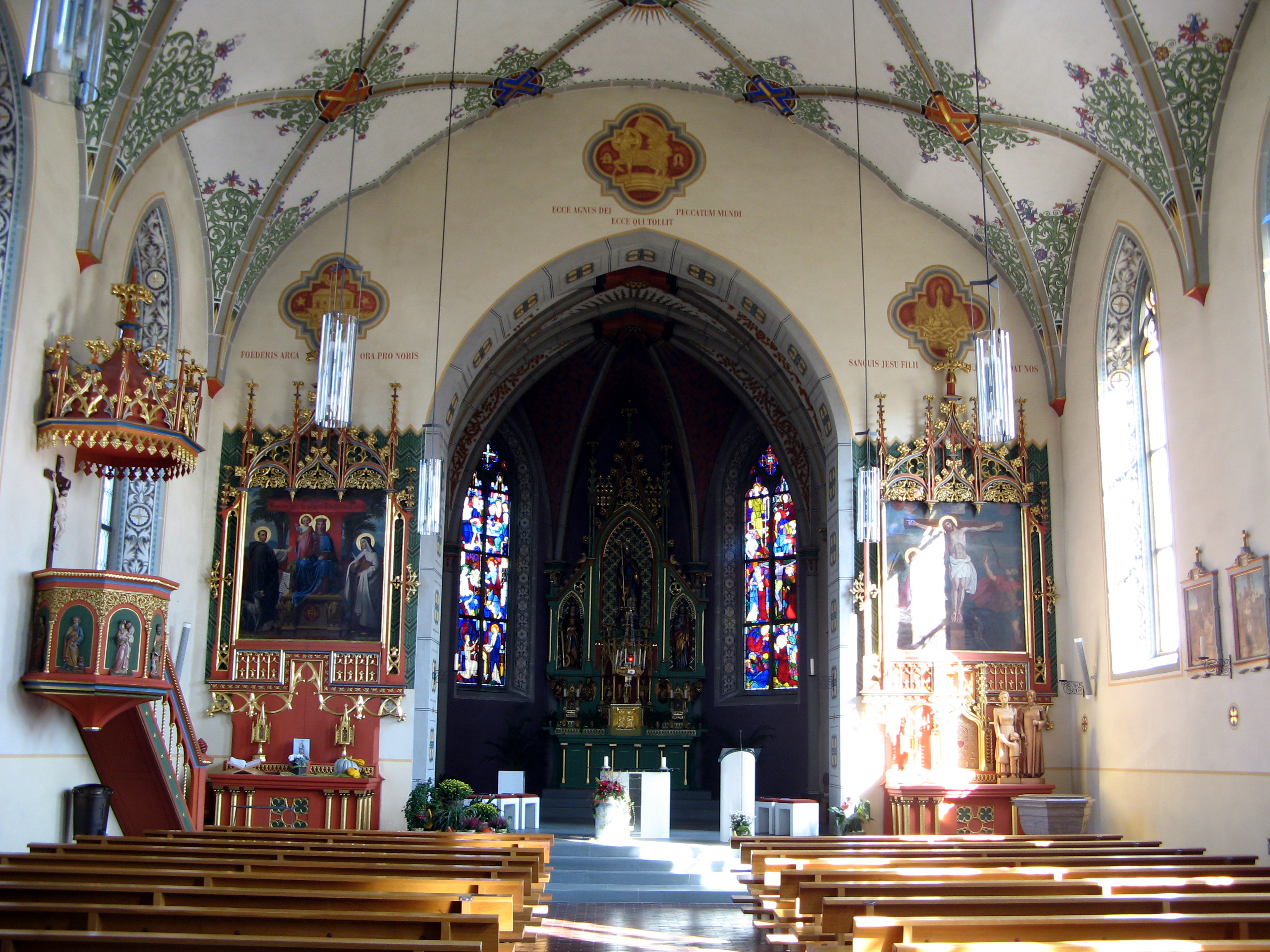 Pfarrkirche St. Rupert in Oberrüti, Innenansicht